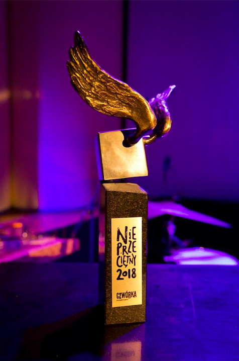 gala plebiscytu "Nieprzeciętni 2018" Czwórki Polskiego Radia, statuetka